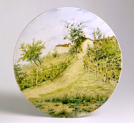 Piatto con decorazione paesaggistica. Giuseppe Ghinassi, Faenza, fine del XIX secolo.